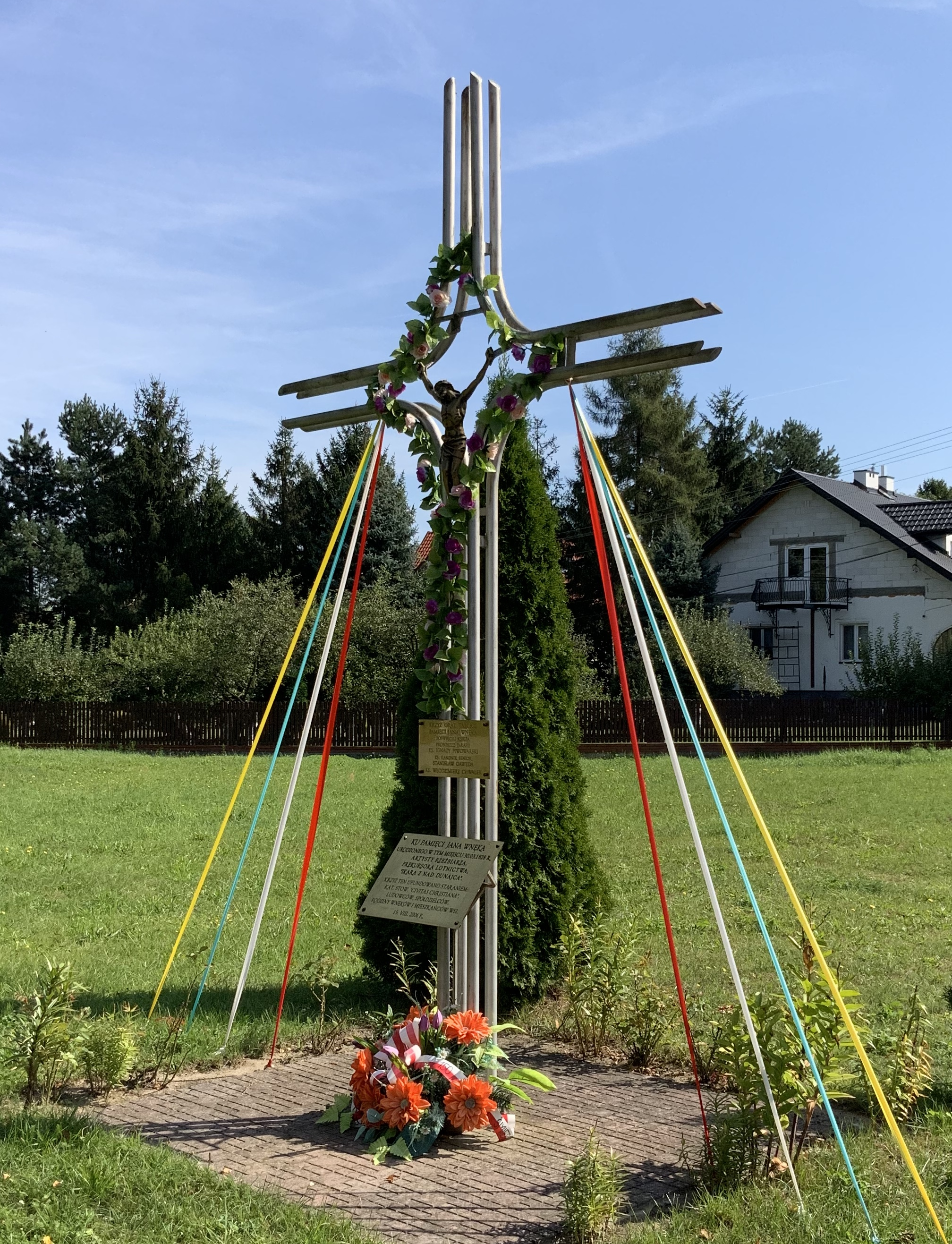 Miejsce urodzenia Jana Wnęka we wsi Żdżary (dawniej Kaczówka) w powiecie dąbrowskim